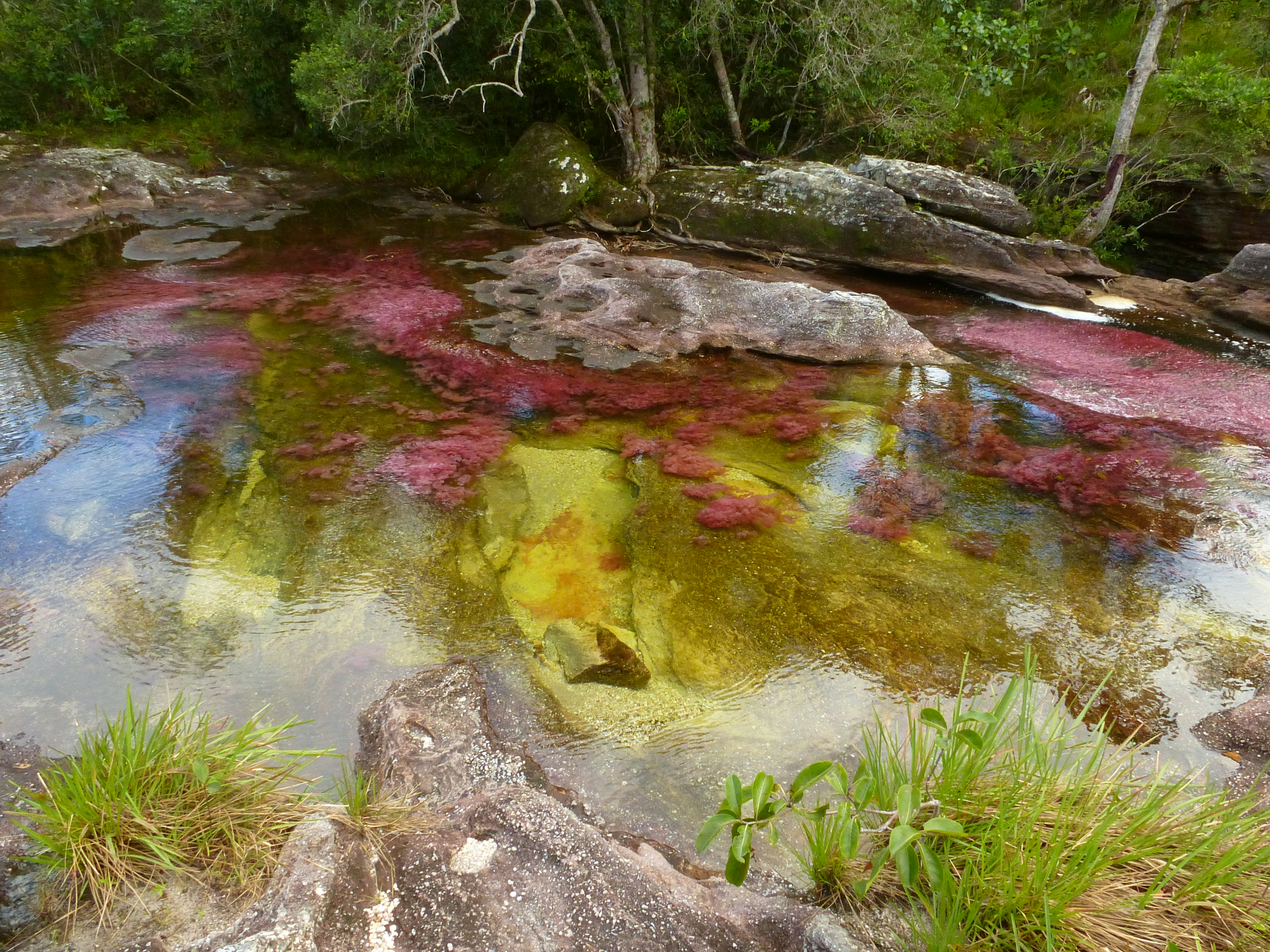 Capturando la esencia de sus colores Esta fotografía fue tomada en un área protegida de Colombia con el código 129 del RUNAP.